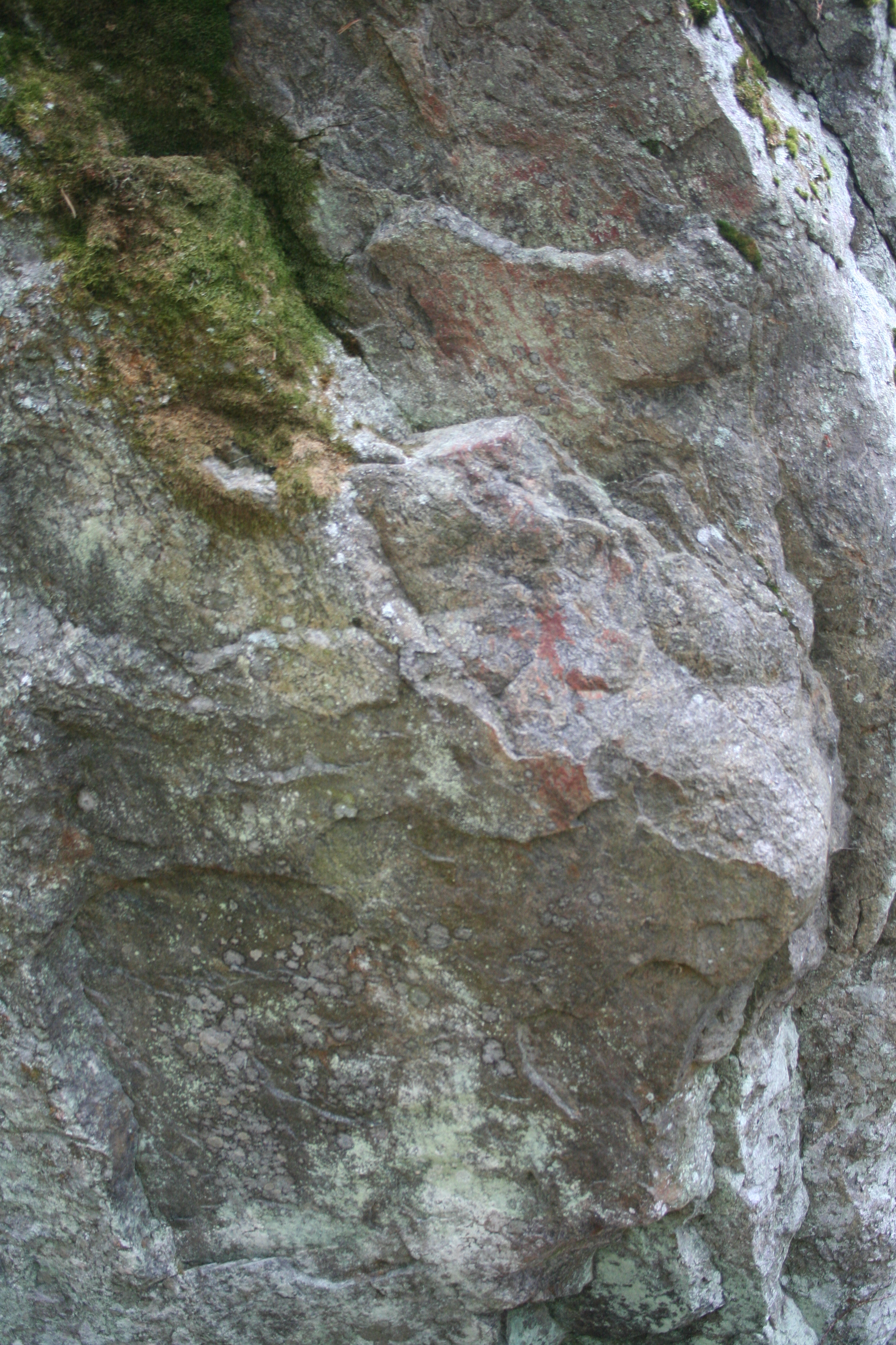 Viheriänkoski, Joutsa, Finland, kalliomaalaus, petroglyph, painting